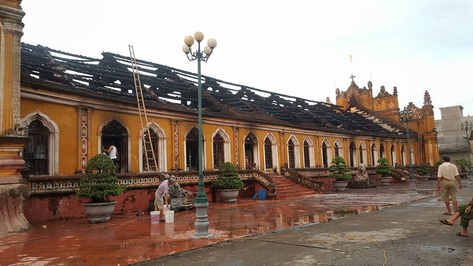 Nhà thờ sau cháy